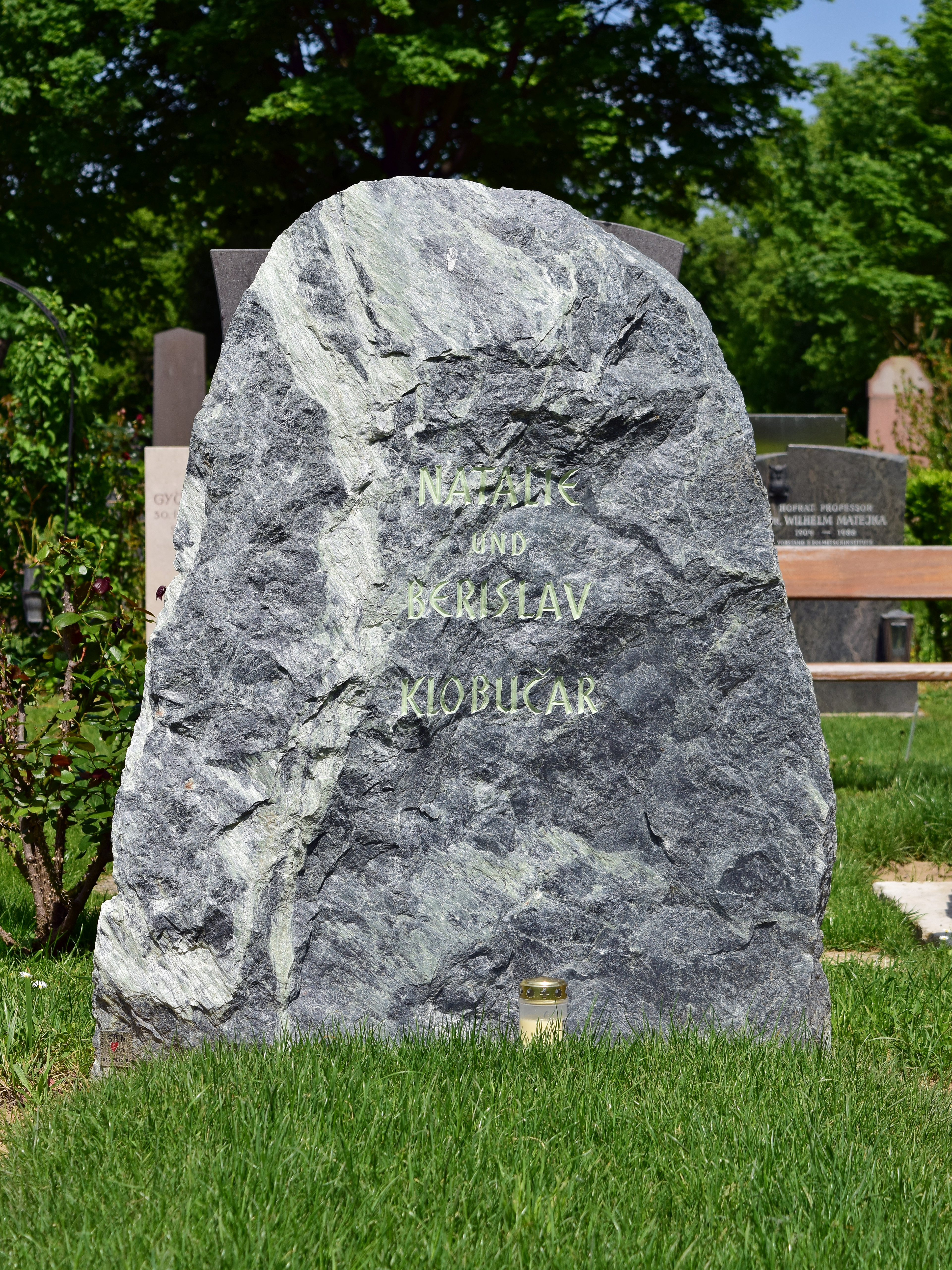 Ehrenhalber gewidmetes Grab von Berislav Klobučar auf dem Wiener Zentralfriedhof, Gruppe 40.